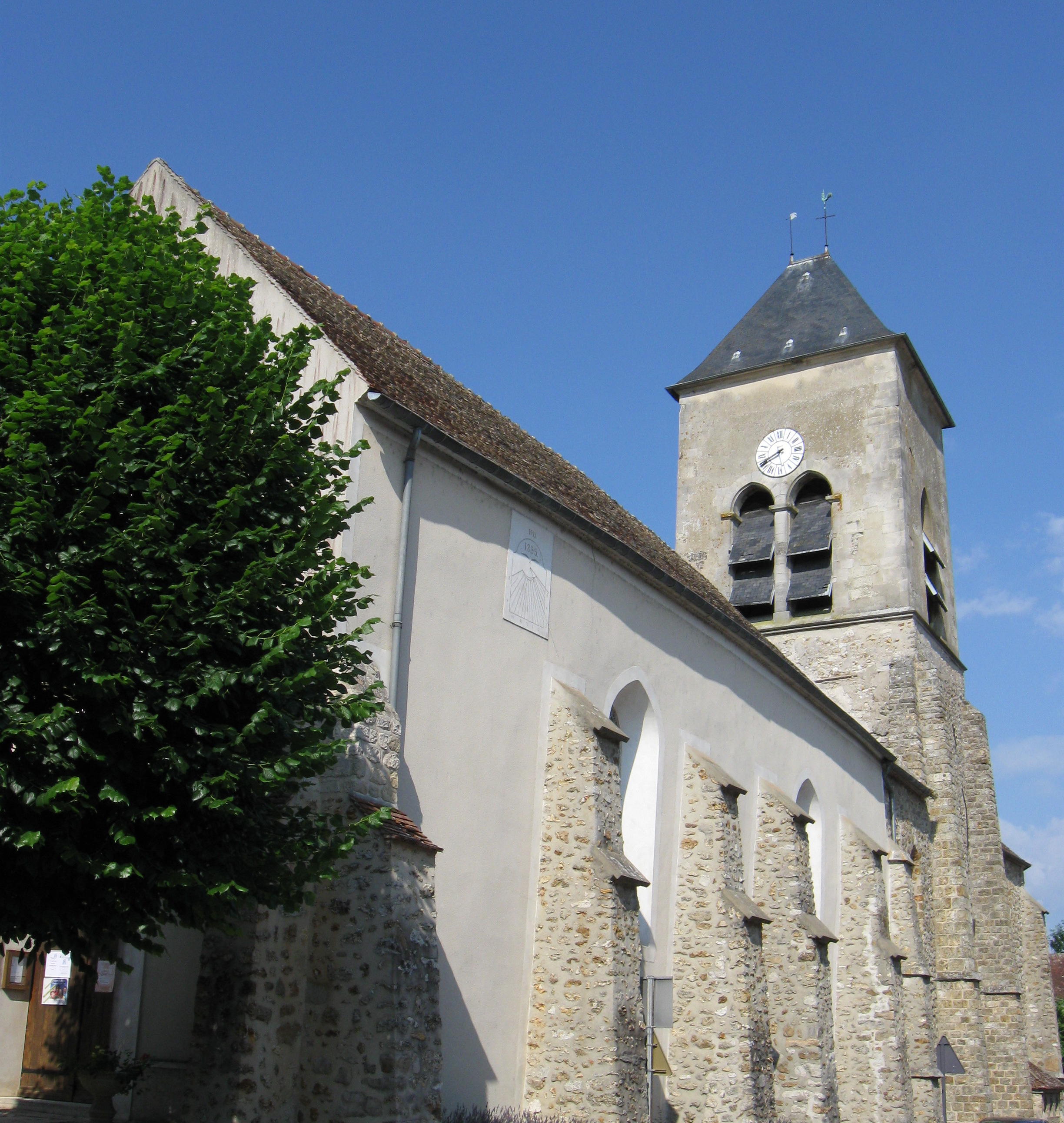 Église Saint-Authaire. (Ussy-sur-Marne, département de la Seine-et-Marne, région Île-de-France).